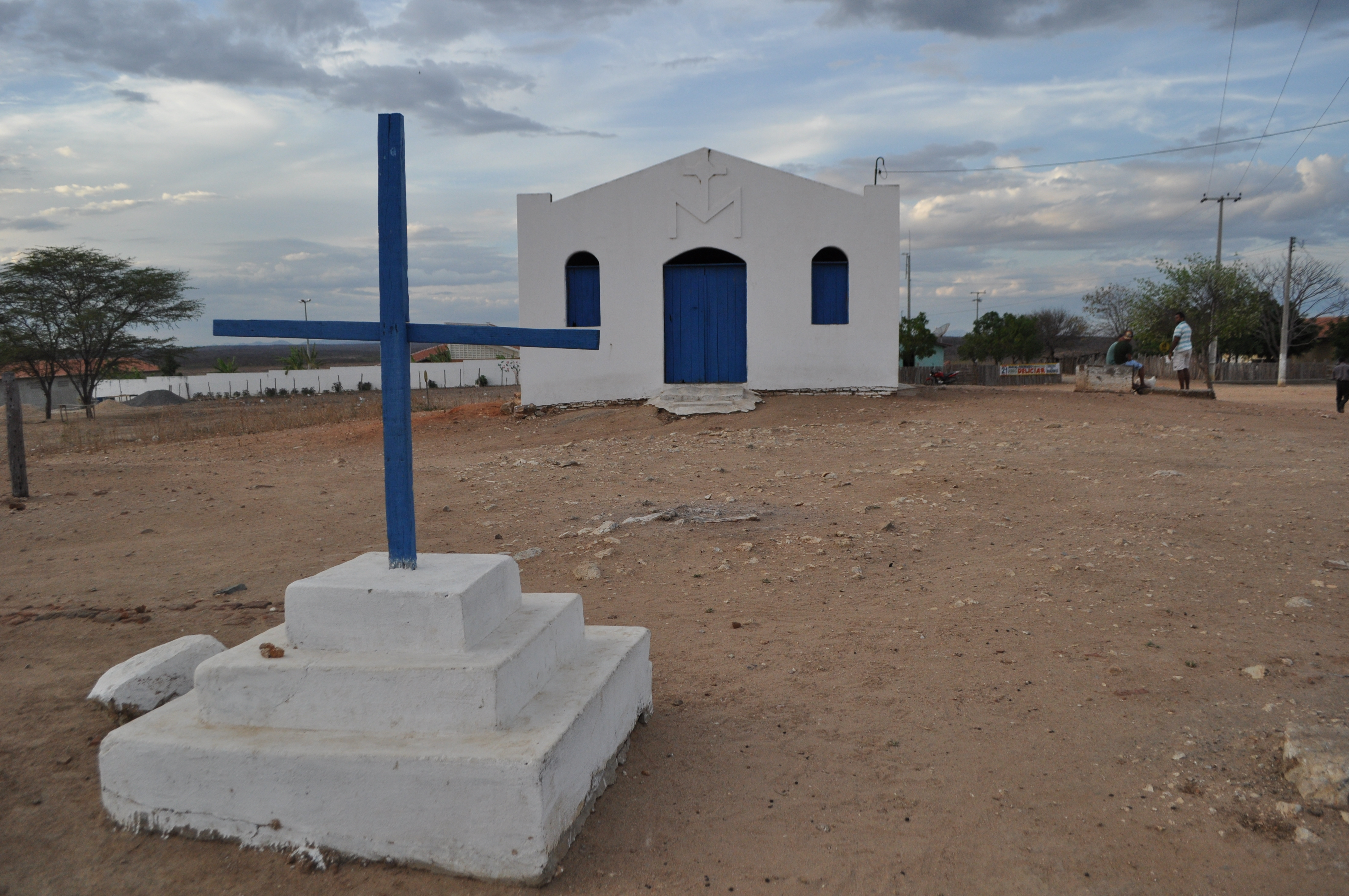 Igreja em assentamento de Madalena (CE)